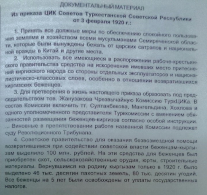 Документальный материал. Из приказа ЦИК Советов Туркестанской Советской Республики от 3 февраля 1920 г.